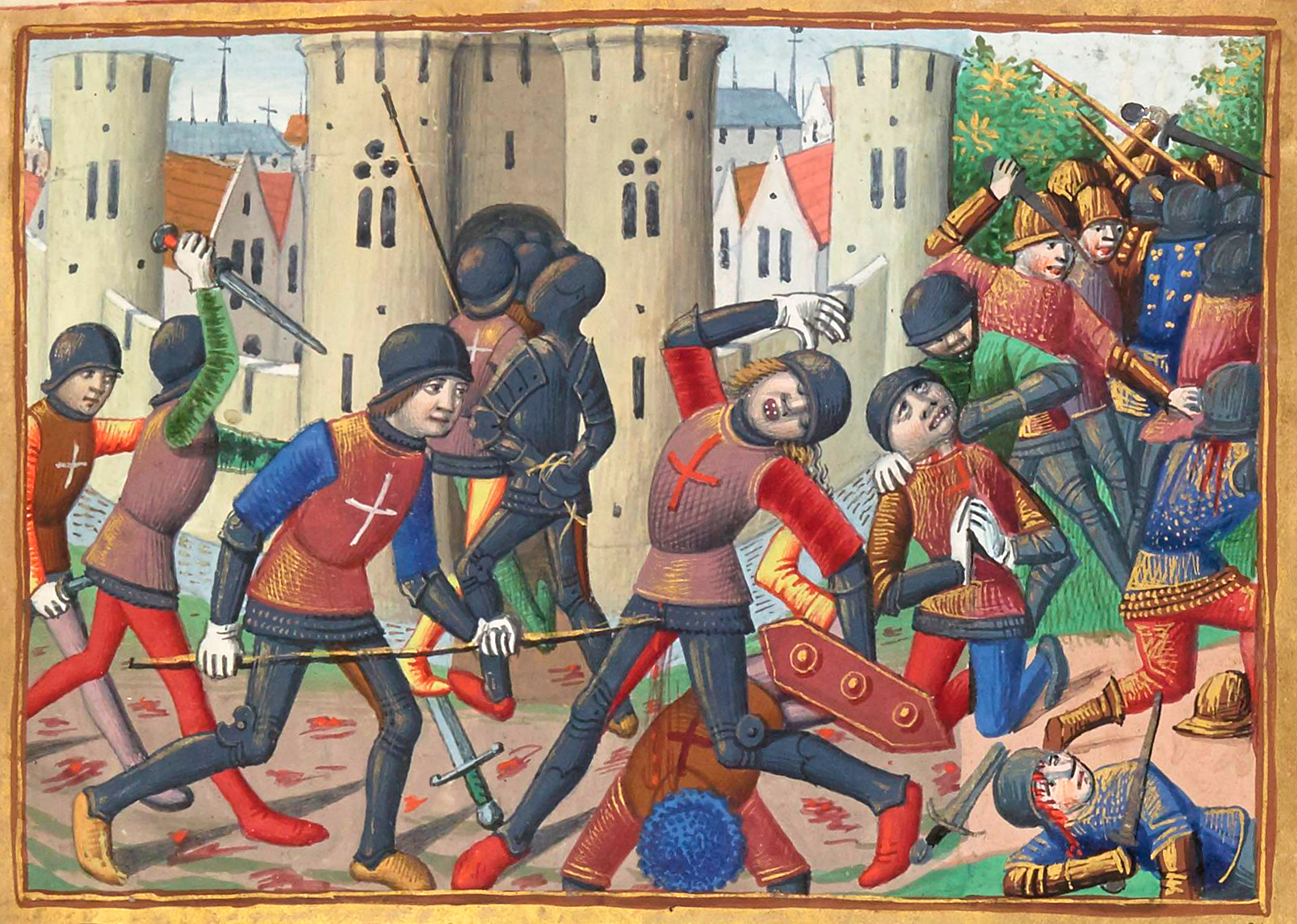 Siège de Montargis en 1427.